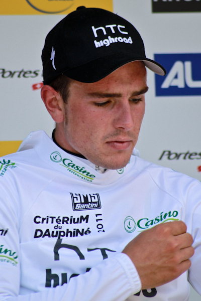 Prologue du Critérium du Dauphiné 2011, Saint Jean de Maurienne